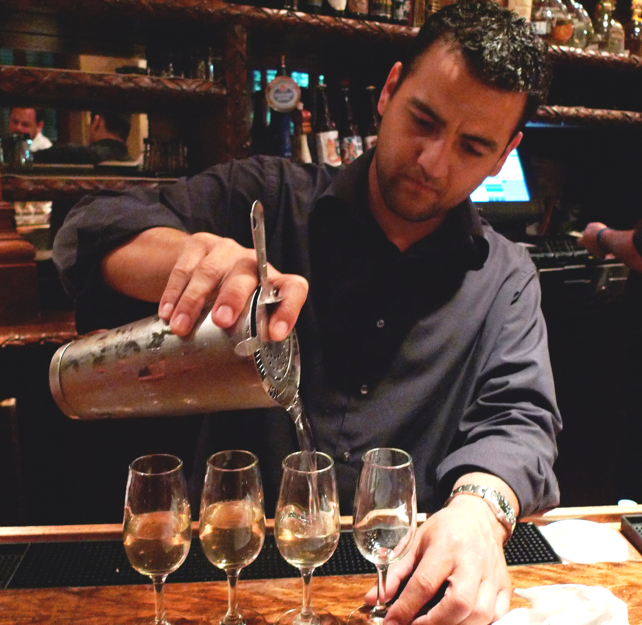 Bartender at Luke, New Orleans.